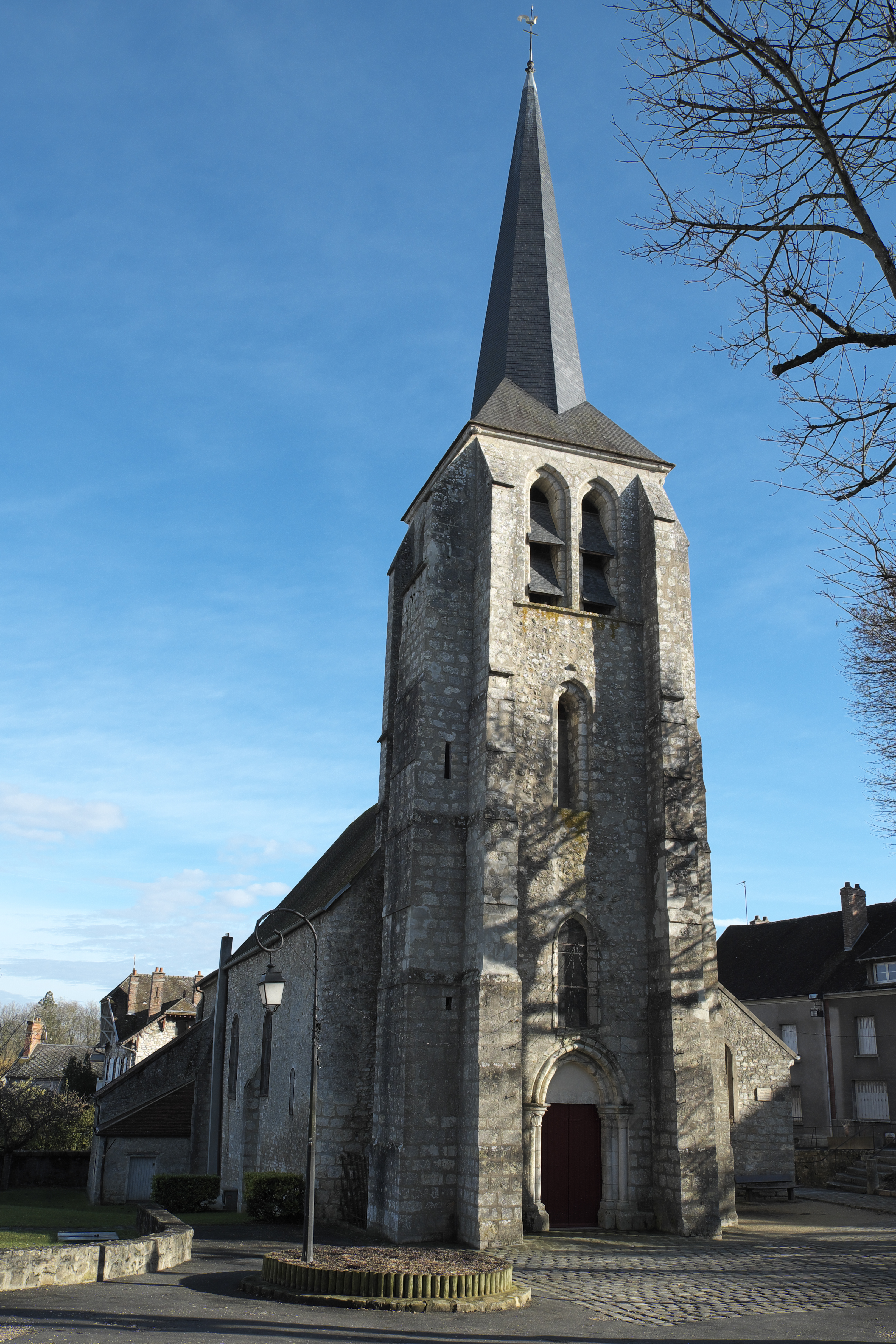 Katholische Kirche Saint-Pierre-et-Saint-Paul in Saint-Pierre-lès-Nemours im Département Seine-et-Marne in der Region Île-de-France (Frankreich), Ansicht von Westen